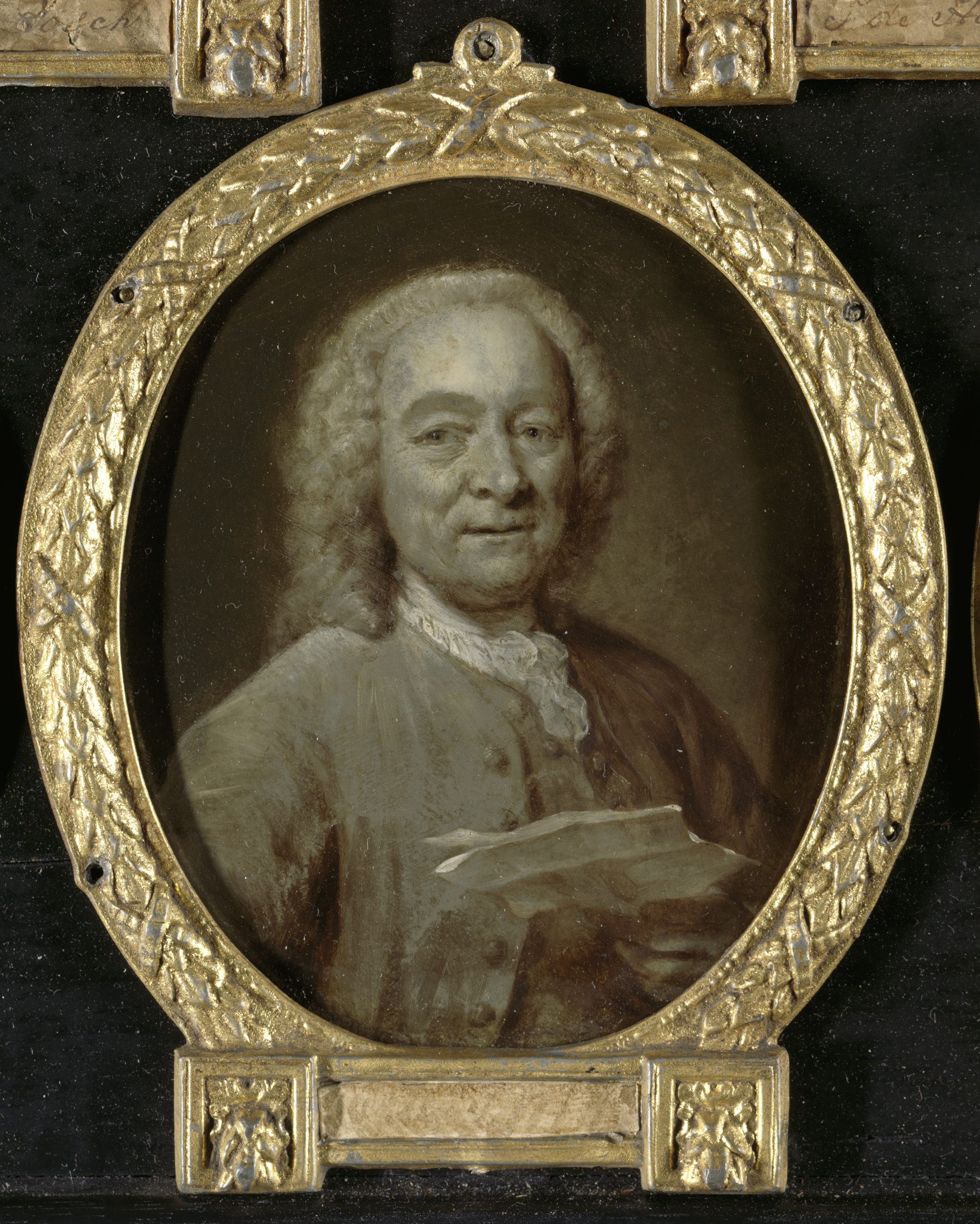 Portret van Jan Harmensz de Marre (1696-1763). Zeeman, dichter en directeur van de Amsterdamse schouwburg. Buste in ovaal, iets naar rechts, het gezicht bijna aanziend, een blad papier in de linkerhand. Onderdeel van een verzameling portretten van Nederlandse dichters. Collection: schilderijen; Panpoeticon Batavum